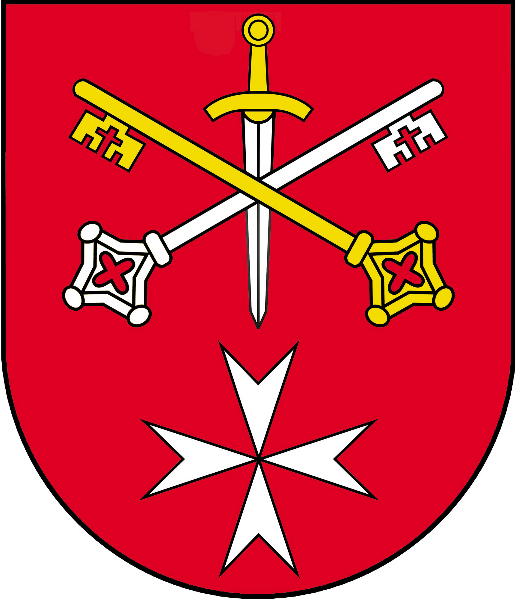 Herb gminy Kleszczewo